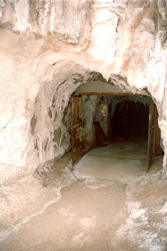 Mina de sal en Cardona (Barcelona) (España). Tomada por JMSE el 20 de julio de 2003 y cedida a Wikipedia. Categoría: España (imagen) Categoría: Minería (imagen)